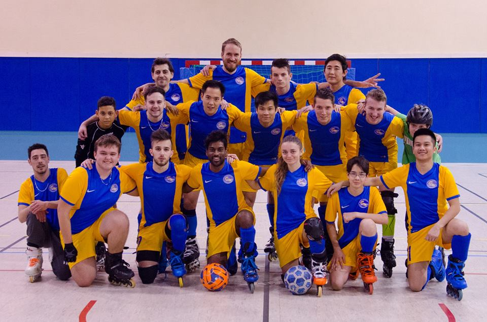 Photo de l'équipe UMS Easy RIders